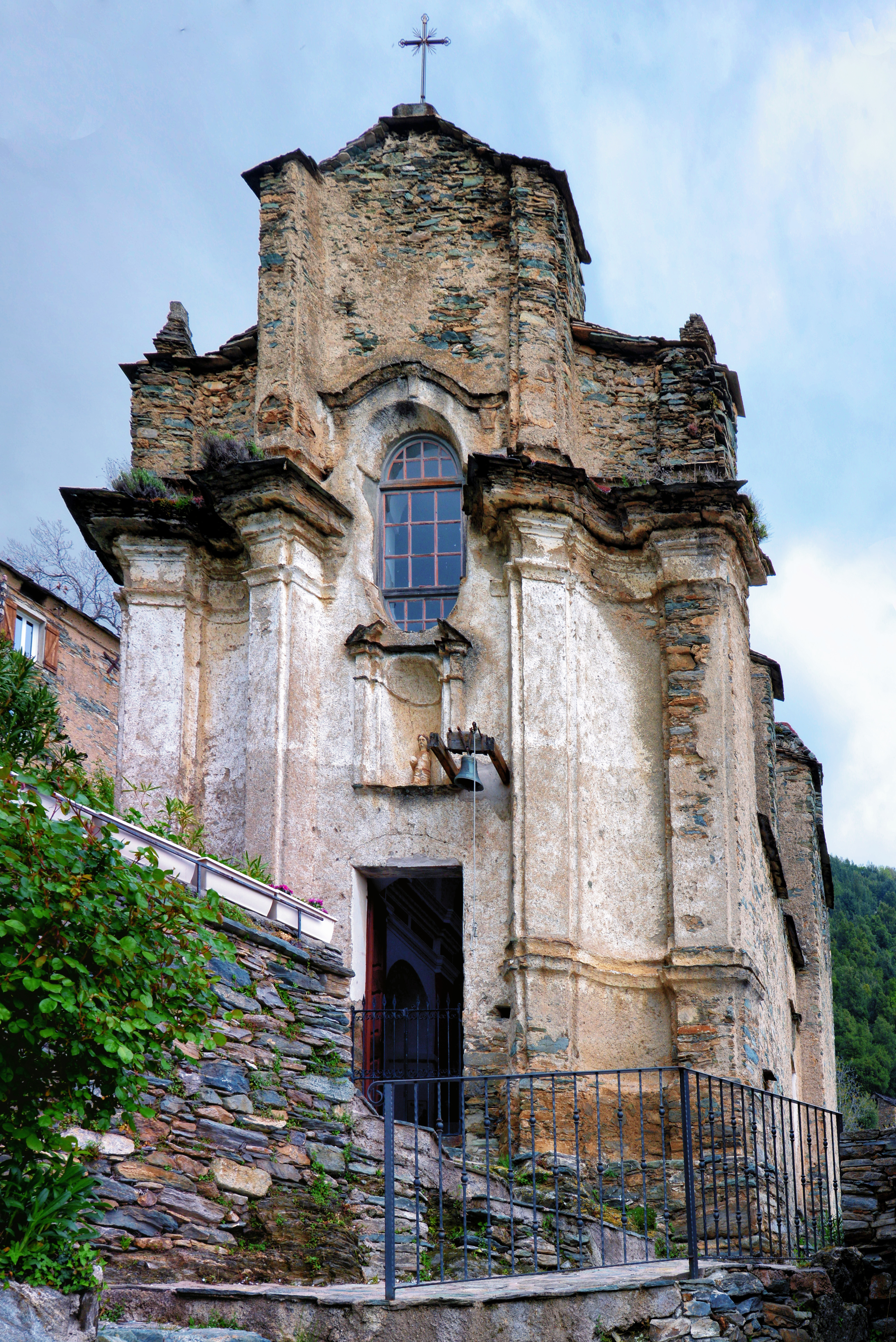 Poggio-Marinaccio, Castagniccia (Corse) - Église Saint-Antoine (baroque du XVIIe siècle) au hameau de Lutina, « à cheval » sur Giocatojo et Poggio-Marinaccio.